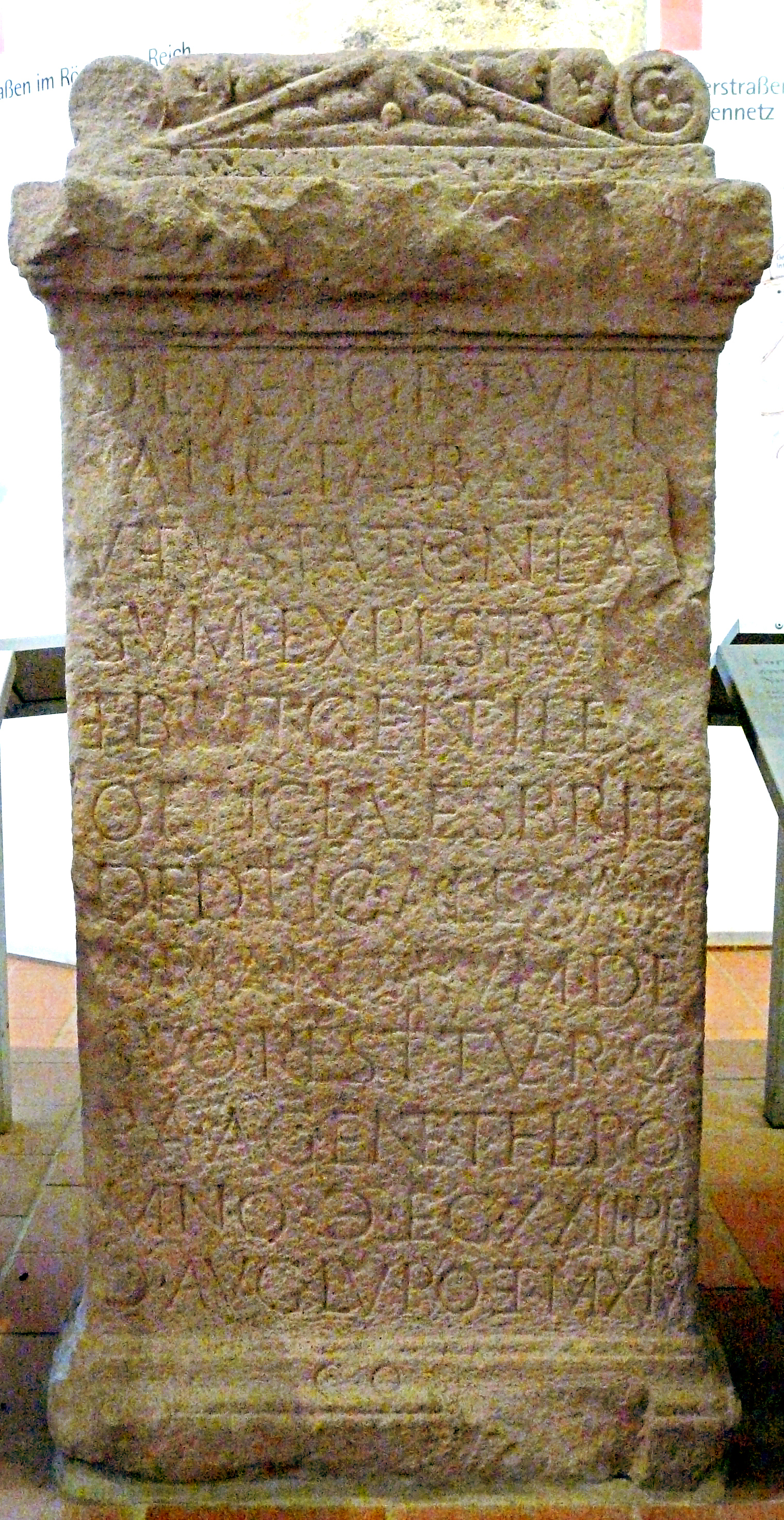 CIL XIII 06592 (AE 1983, 00729) aus dem Bad des Kastells Walldürn als Abguss im Saalburgmuseum: Deae Fortuna[e] / sanctae balineu[m] / vetustate conlap/sum expl(oratores) Stu[ri] / et Brit(tones) gentiles [et] / officiales Bri(ttonum) et(?) / deditic(iorum) Alexan/drianorum de / suo restituer(unt) cu/ra(m) agente T(ito) Fl(avio) Ro/mano (centurione) leg(ionis) XXII P(rimigeniae) P(iae) F(idelis) / Id(ibus) Aug(ustis) Lupo et Maximo // co(n)s(ulibus)